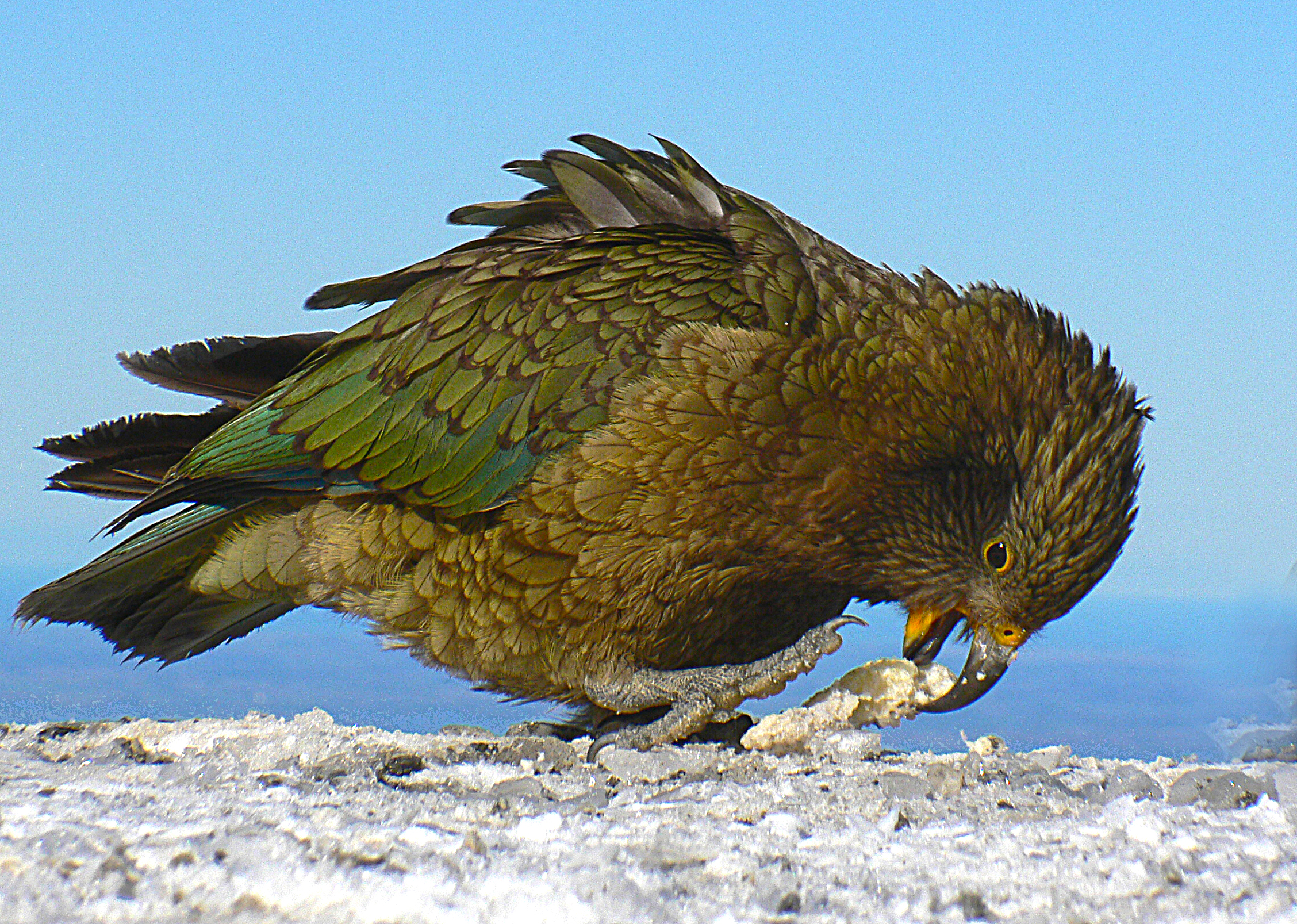 Nestor notabilis